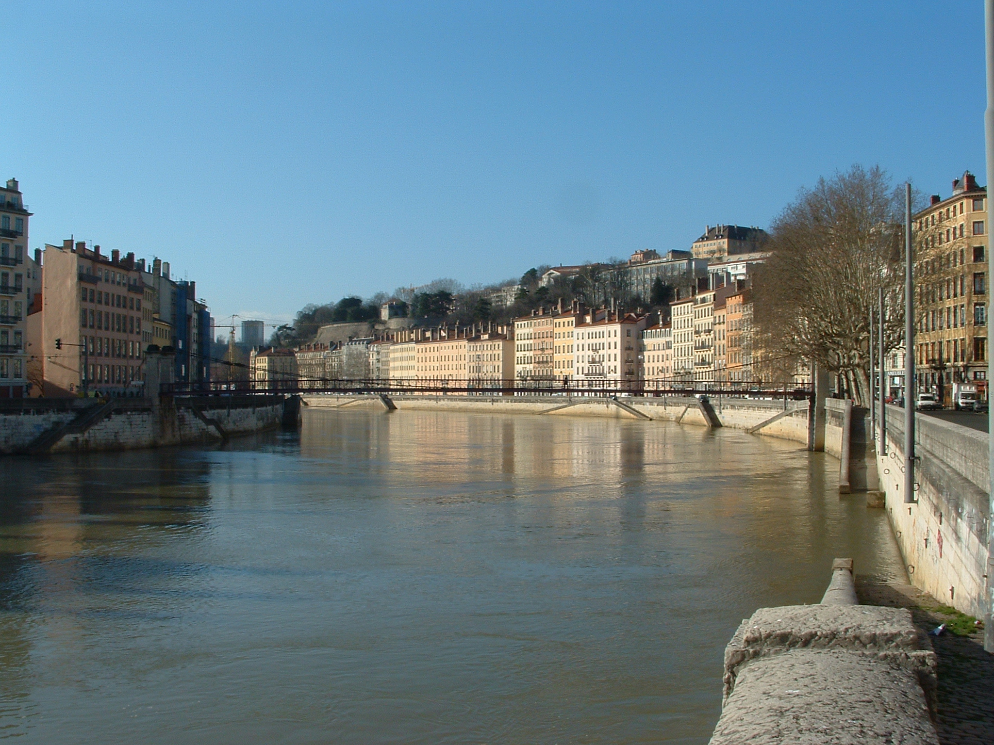 Quai de Saône